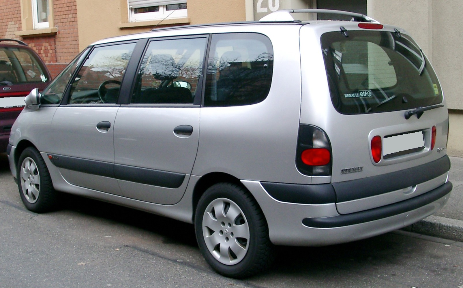 Renault Espace, 3. Generation